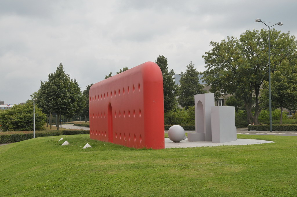 Sculpture De muur (1988) by Alfred Eikelenboom (Tegal Indonesië 1936), Laan van Mensenrechten in Apeldoorn/The Netherlands. ‘Een regelmatig patroon van kleine gaatjes en afgeronde vormen maken de wand van dichtbij gezien overzichtelijk en benaderbaar. Een poort in het midden opent het zicht op een halfrond plateau waarop enkele basale architectonische elementen zoals een rechthoek, een kubus en een perfecte bal bij elkaar liggen alsof ze op een toneelvloer voor het publiek worden opgevoerd’.